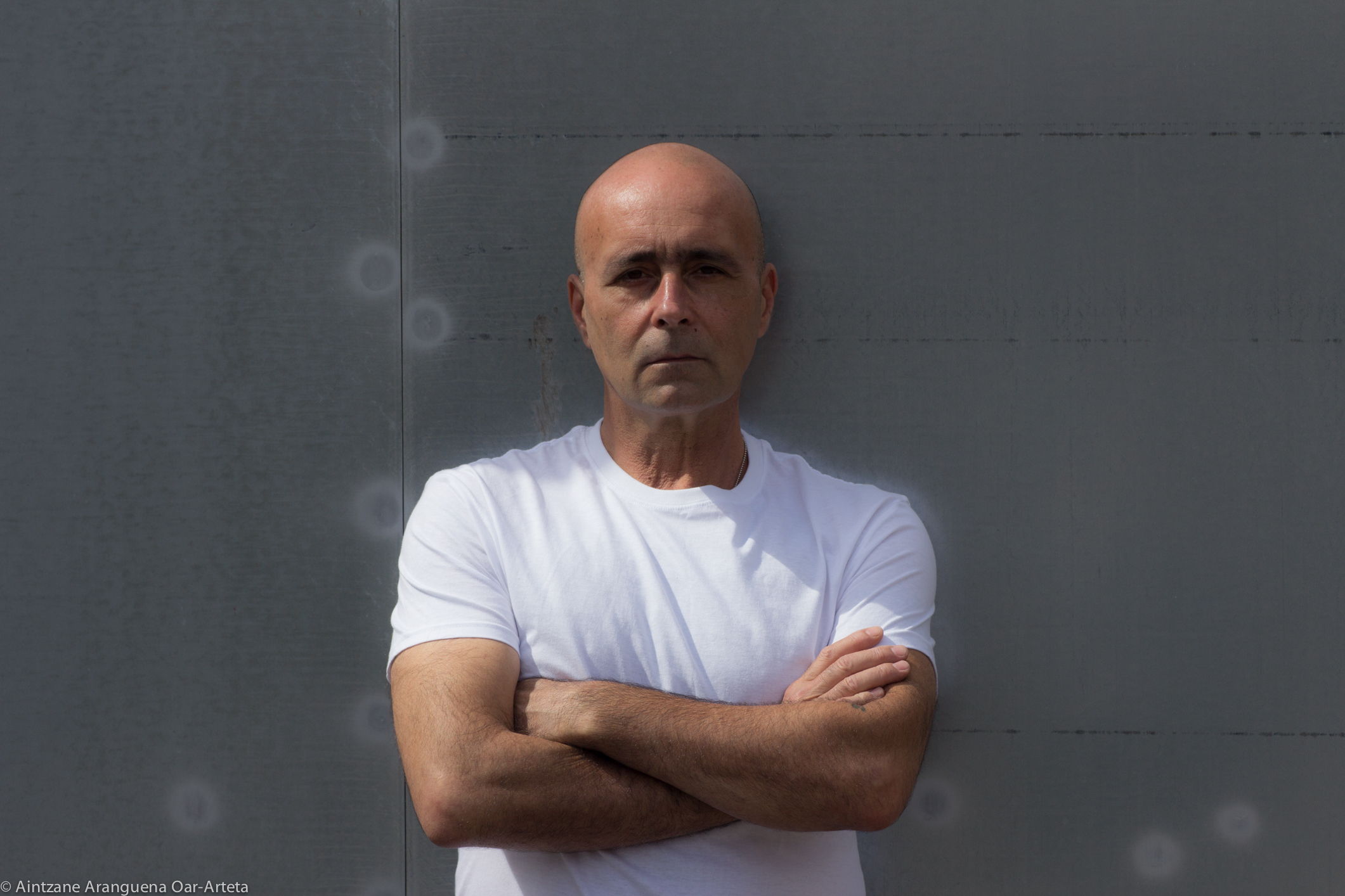 Corcobado 2019